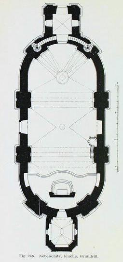 Hornjoserbsce: Podrys Njebjelčanskeje cyrkwje swj. Měrćina spočatk 20. lětstotka.